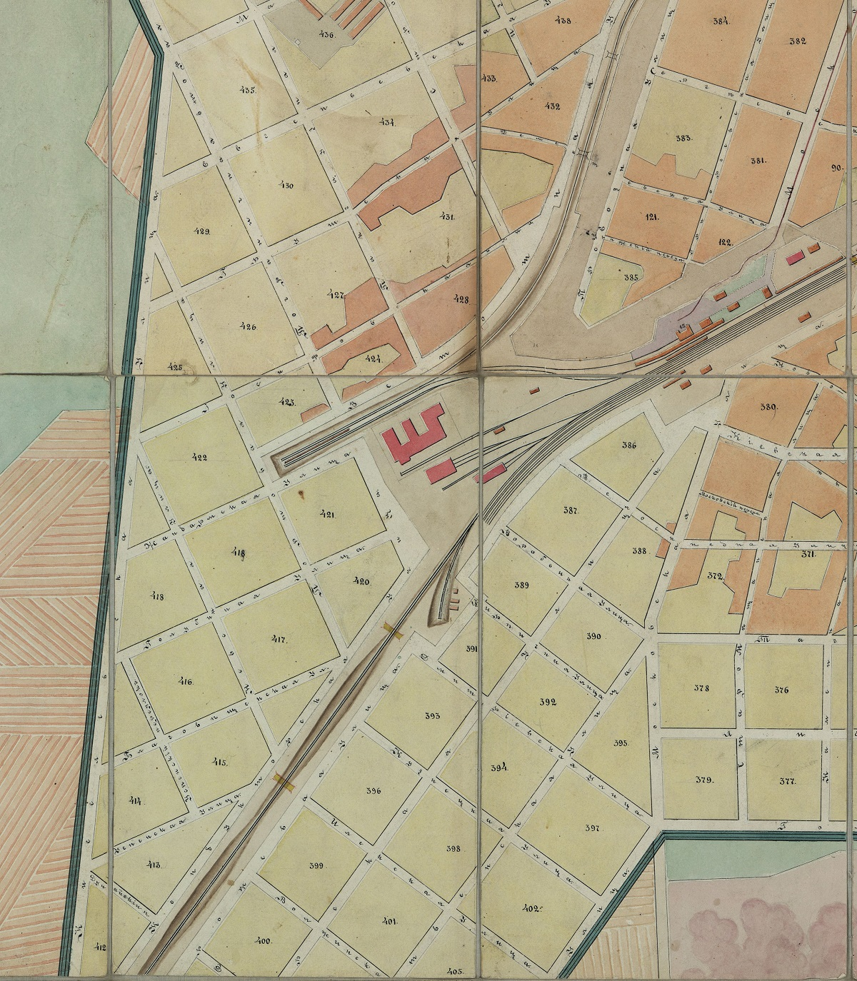 Беларуская (тарашкевіца): Менск (Miensk), Грушаўка (Hrušaŭka) і Добрыя Мысьлі (Dobryja Myśli). Плян